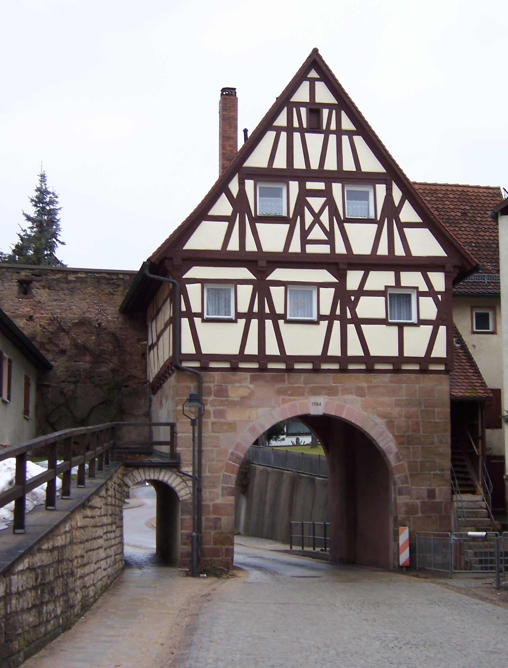 Pleinfeld, Spalter Tor